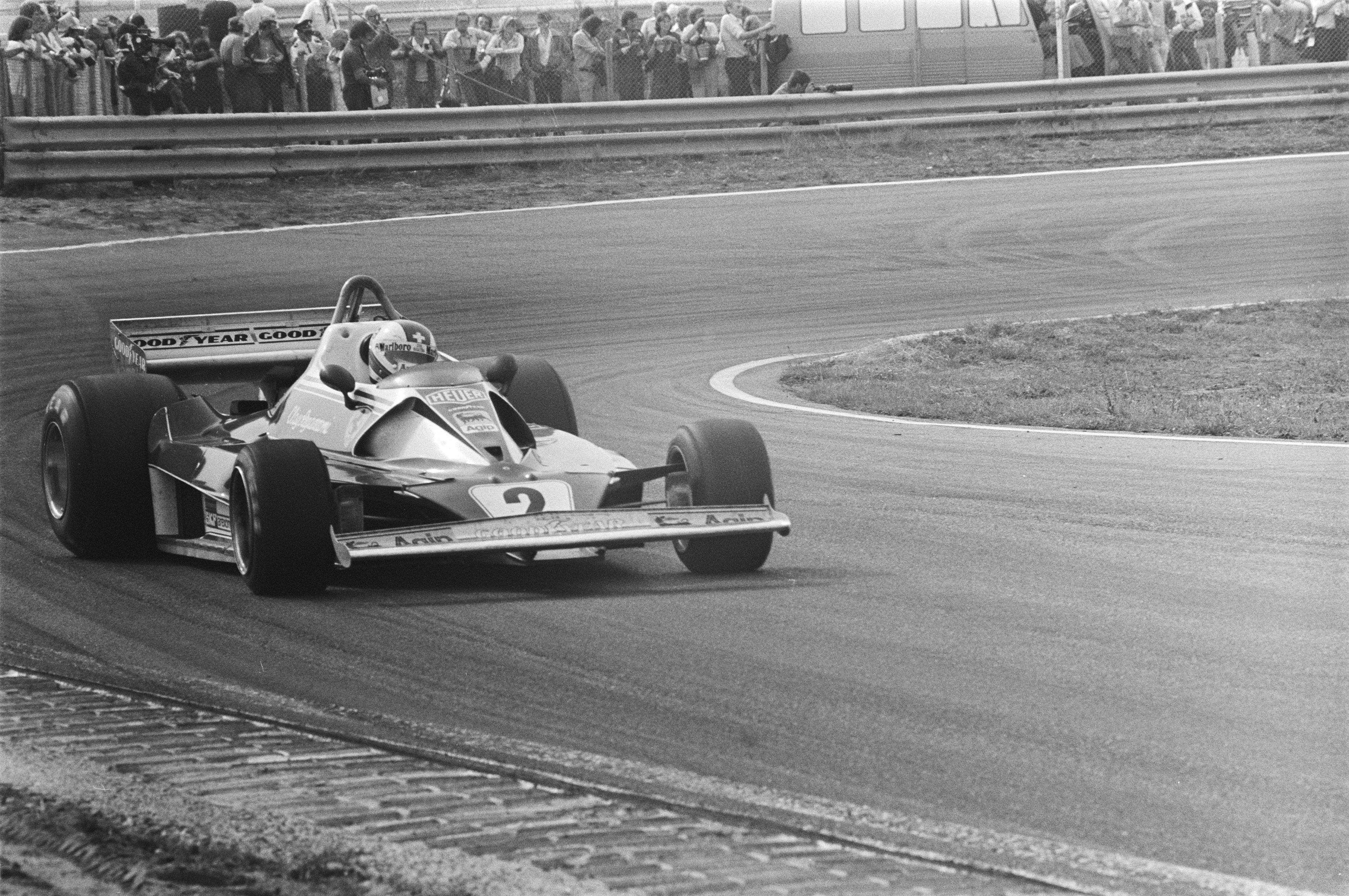 Grand Prix op Zandvoort, 18, 19, James Hunt ; 19, 21, Reggazoni met Ferrari.